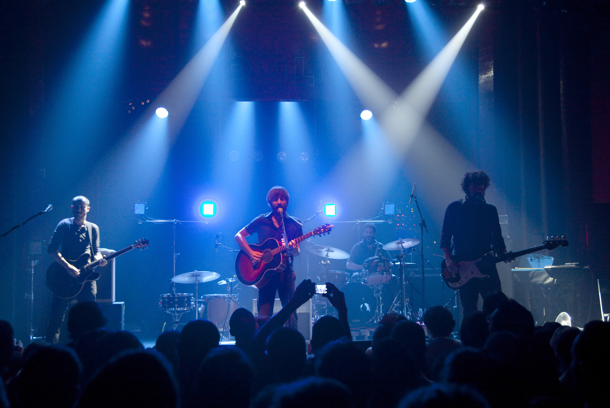 Standstill - Sala Apolo (11/06/2010)